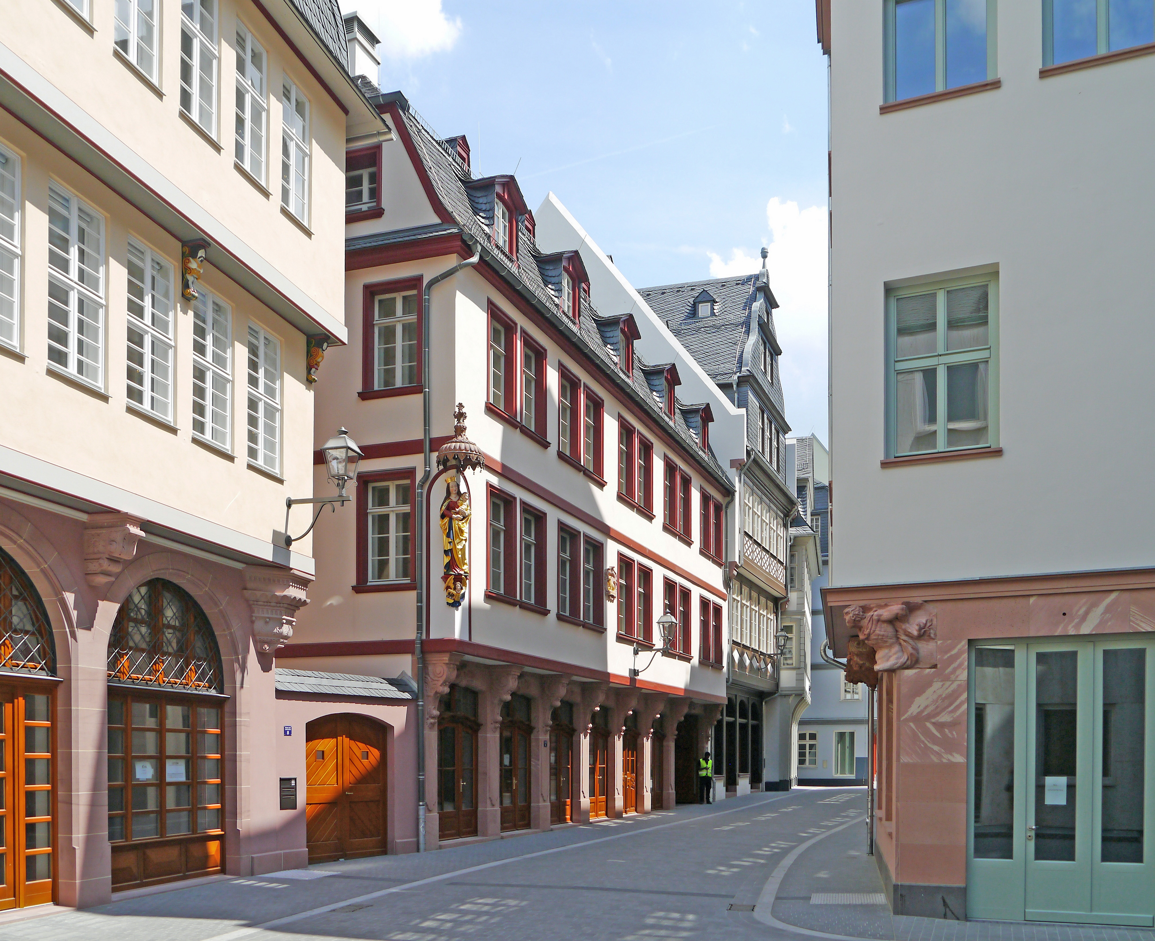 Die Häuserzeile Hinter dem Lämmchen 8 bis 2, 2018 in der Altstadt von Frankfurt am Main.